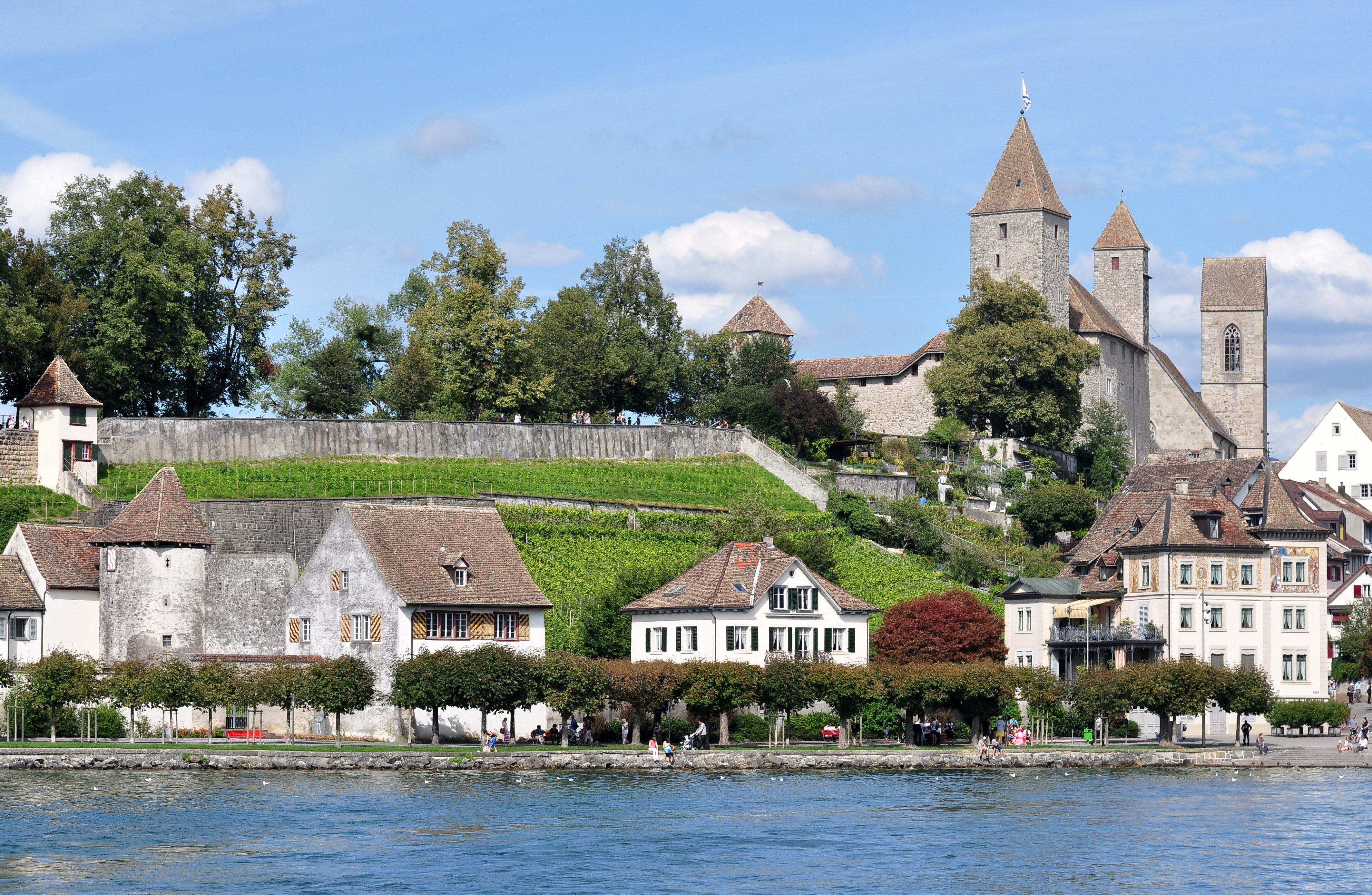 Rapperswil (Switzerland) : Lindenhof hill and the castle (Schloss), and on lakeshore the Einsiedlerhaus and Curti buildings, as seen from Zürichsee-Schifffahrtsgesellschaft (ZSG) paddle steamship Stadt Rapperswil.